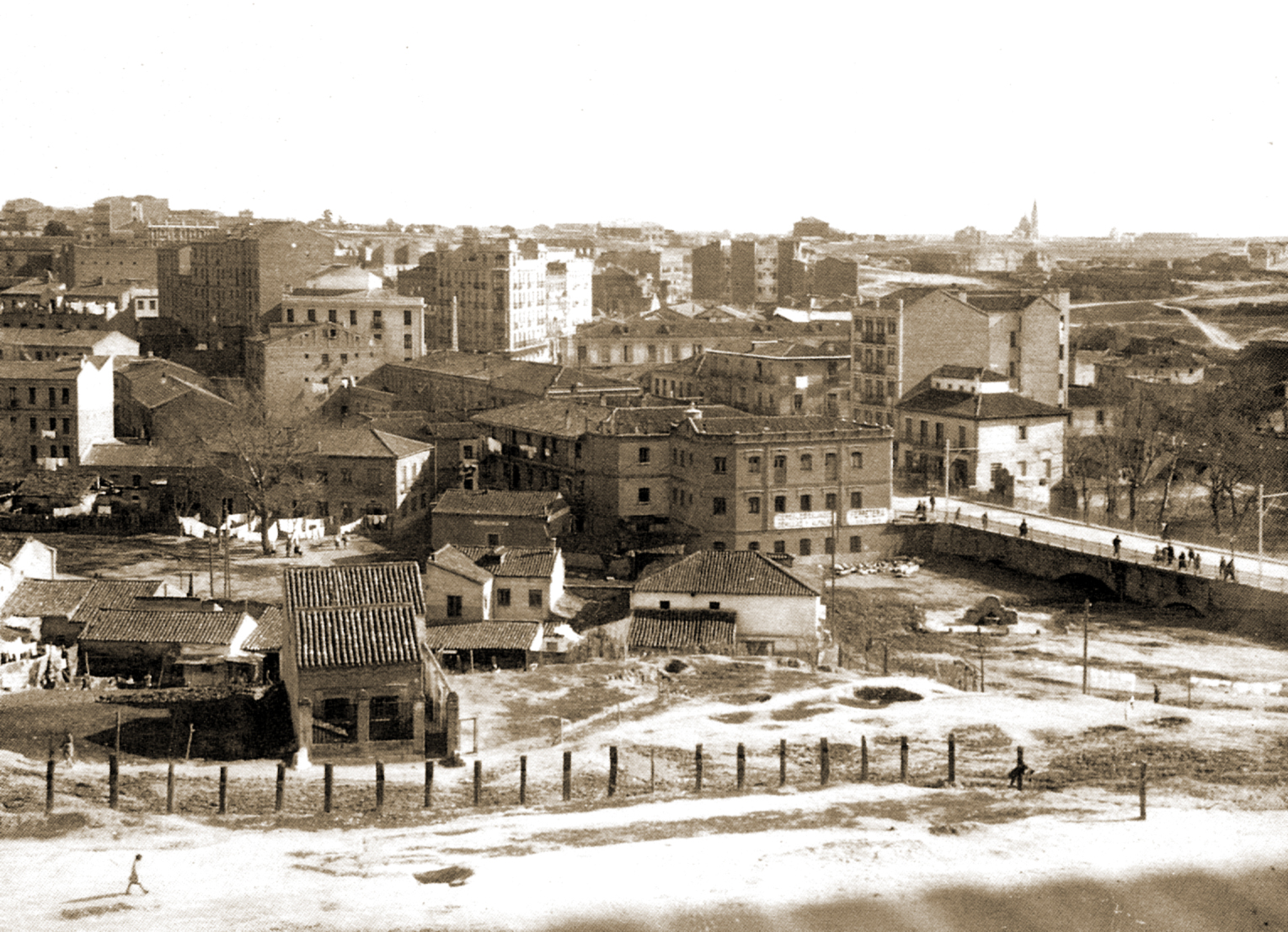 Vista del Abroñigal desde Ventas